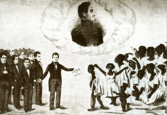 El Presidente José Gregorio Monagas otorgandole la libertad a los esclavos.